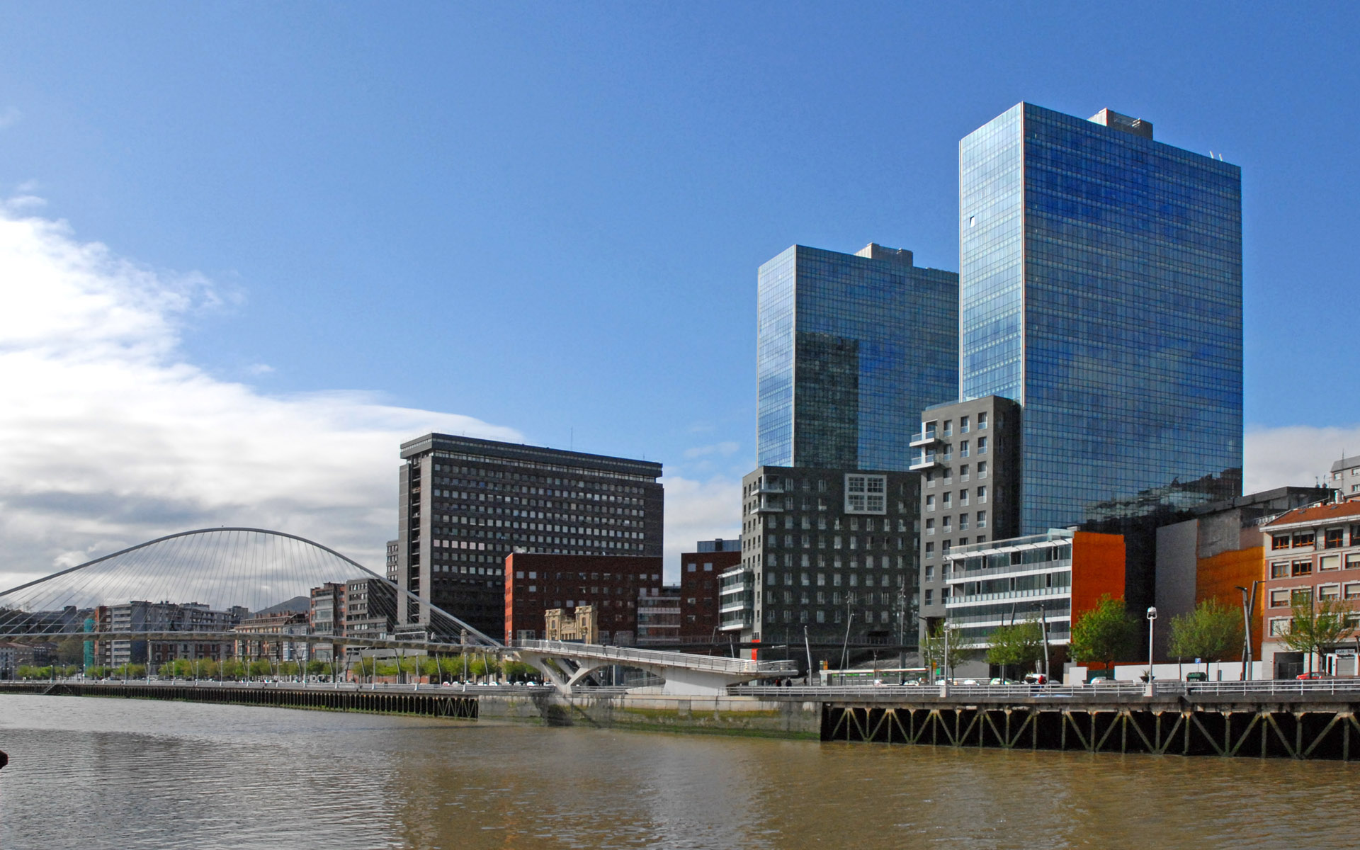 Zubizuri : passerelle conçue par Santiago Calatrava et à droite : le nouveau quartier d'affaires sur la rive gauche de la Ria de Bilbao.